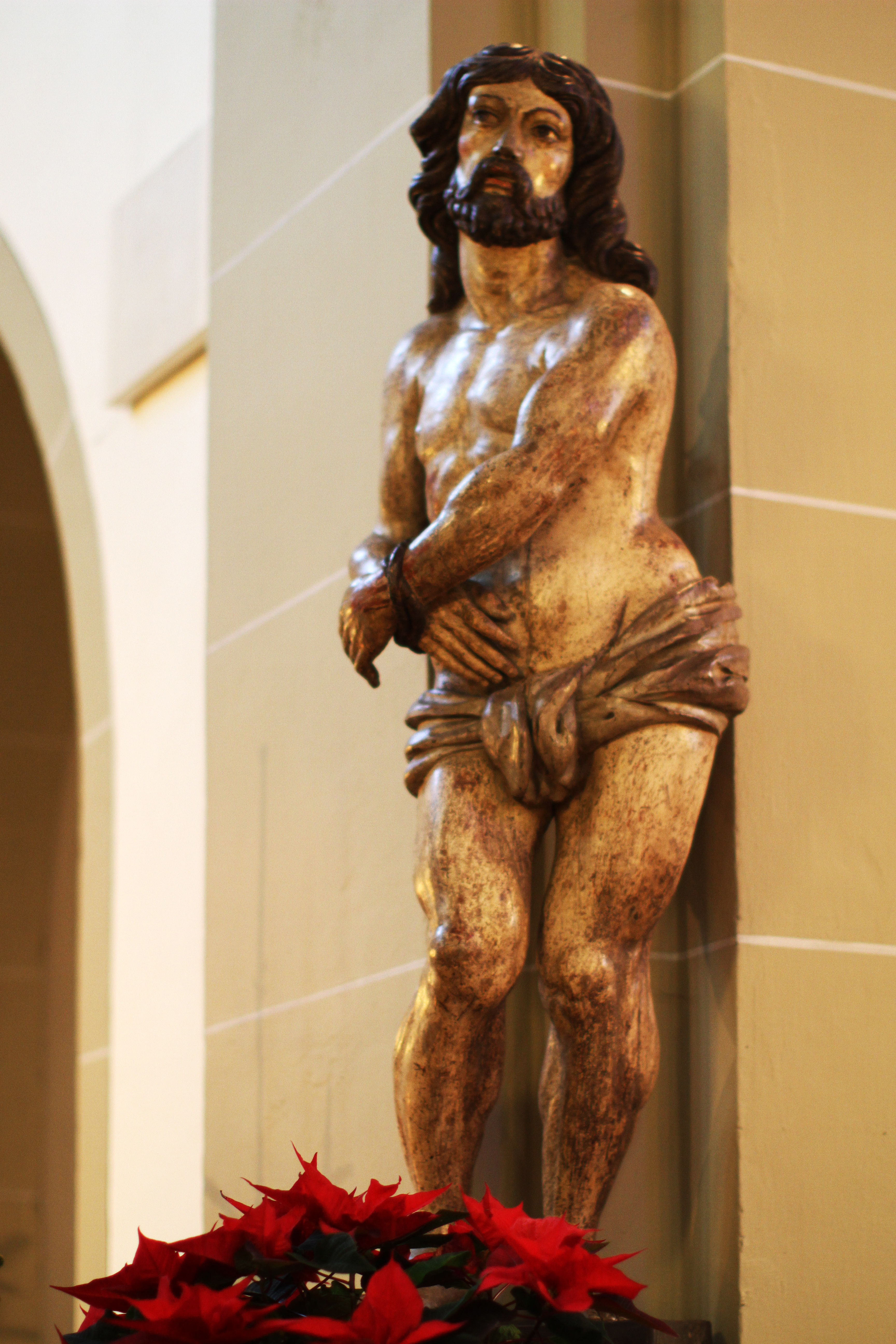 Alt-Hürth, St. Katharina